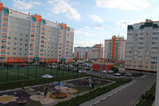 Вечер новом в спальном районе Пробуждение. г.Орёл. 2013 г.